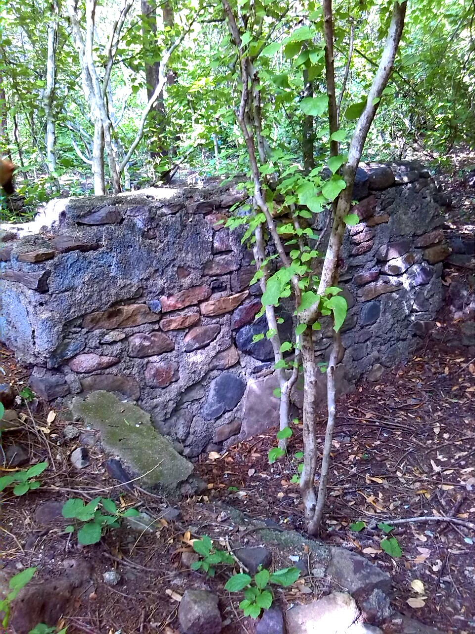 Estructuras en ruinas de plantas añileras en canton el rincon